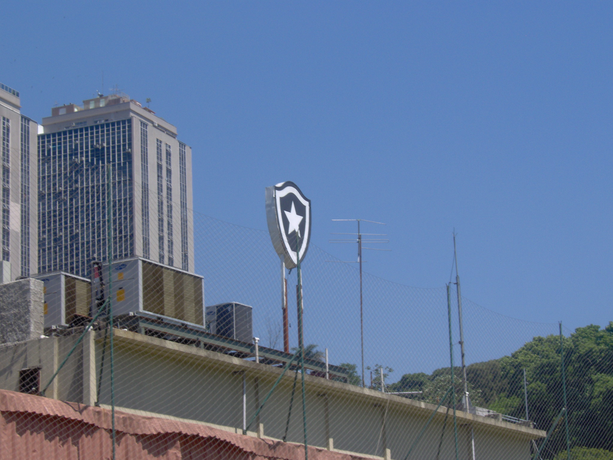 Escudo do Botafogo de Futebol e Regatas no CT João Saldanha, no Rio de Janeiro.